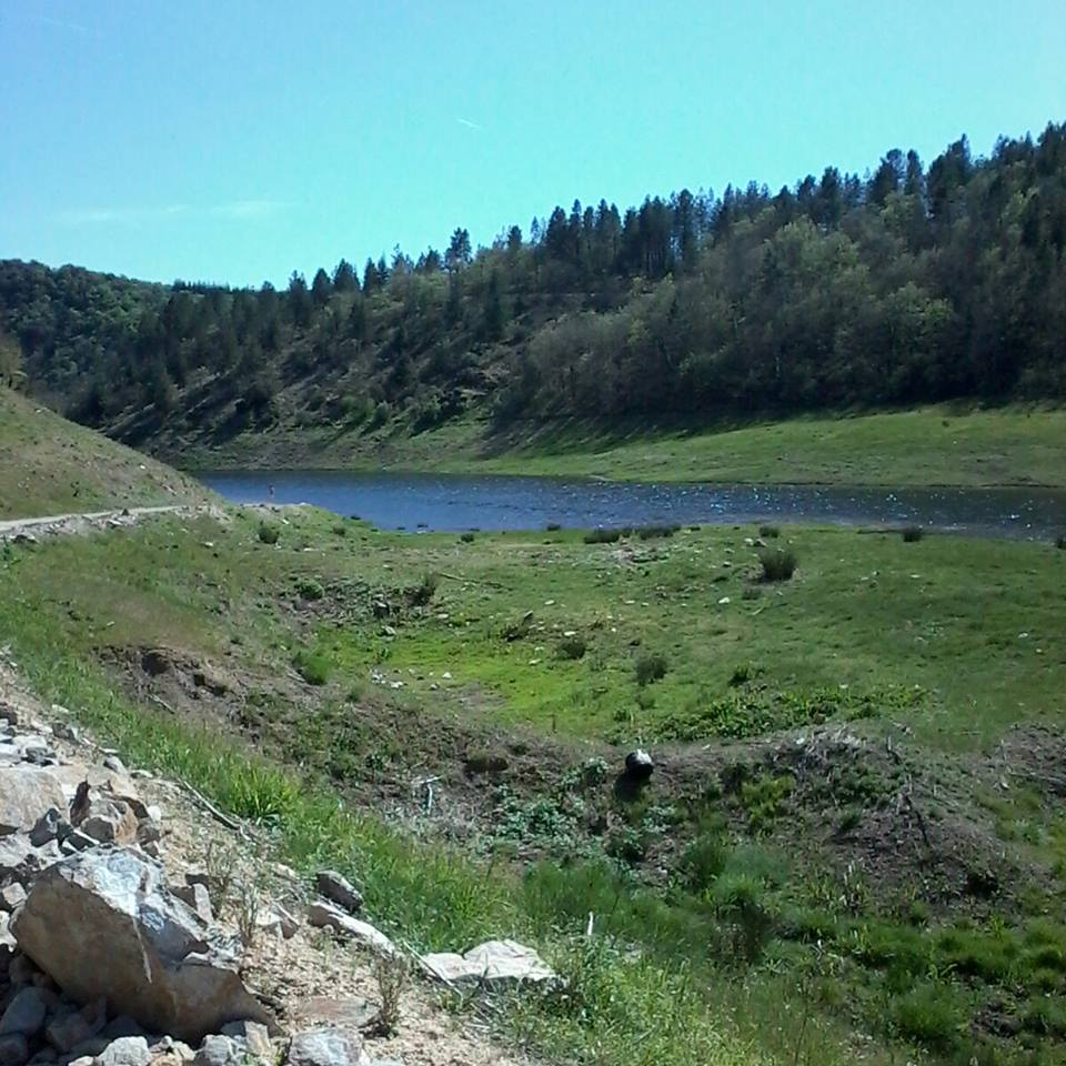 Lac de Meaulx bras nord